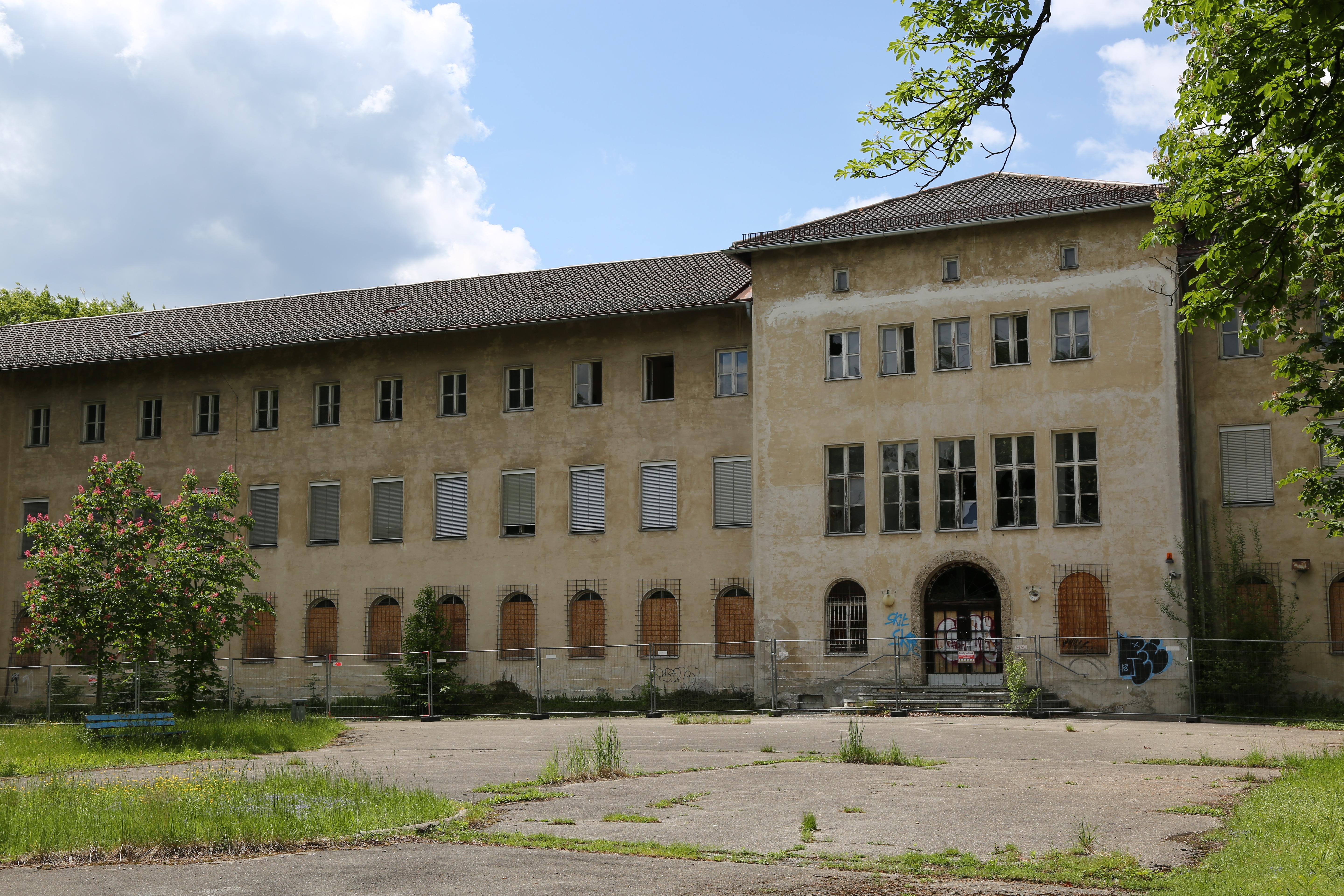 Die leerstehenden Gebäude der früheren Bayerischen Landesschule für Gehörlose in München Sendling-Westpark